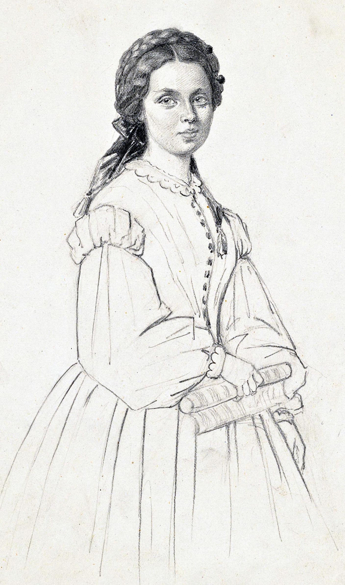 Fredrika Andrée Stenhammar (1836-1880)